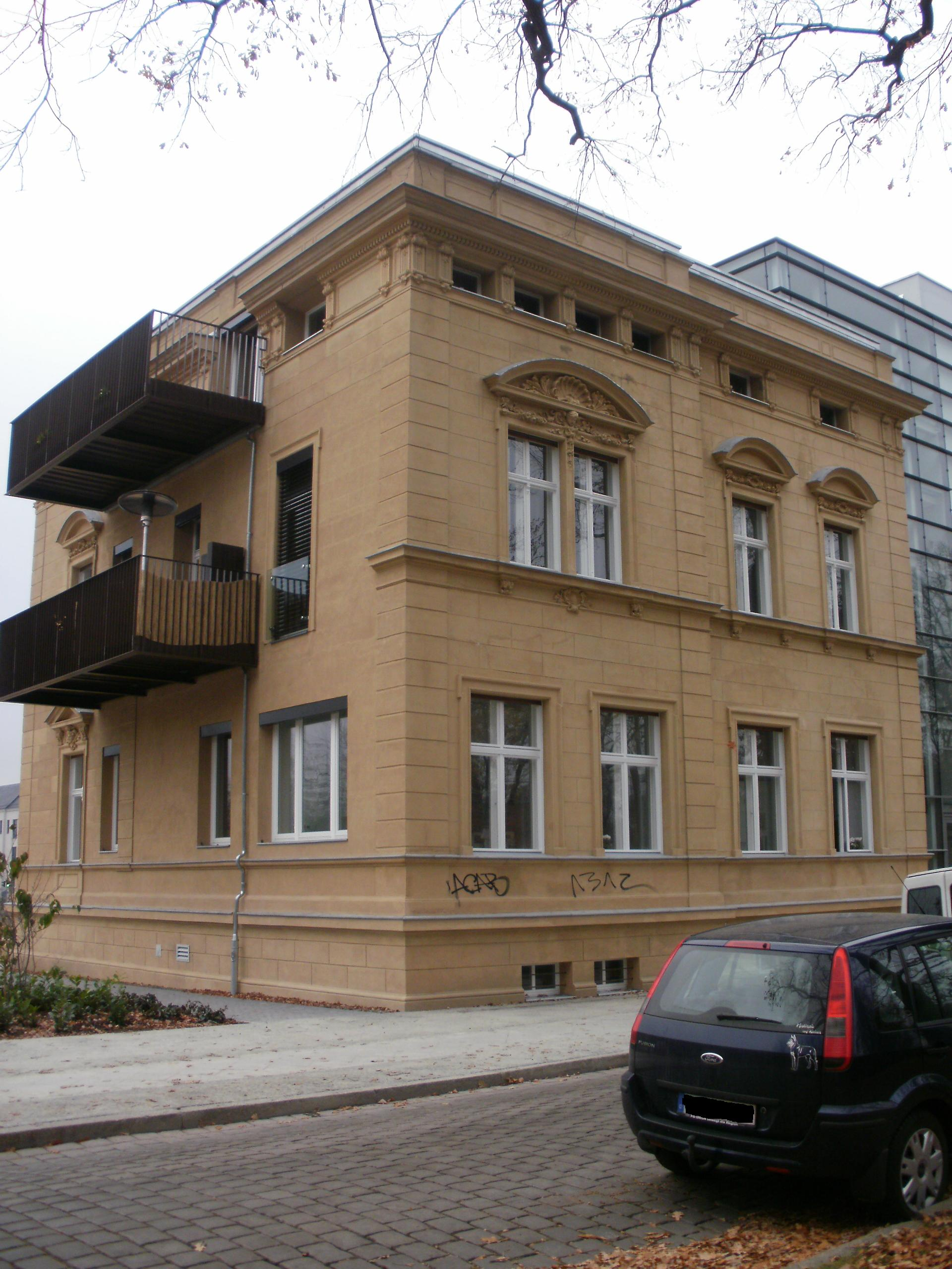 Fabrikantenvilla Ostrower Damm 17, Cottbus